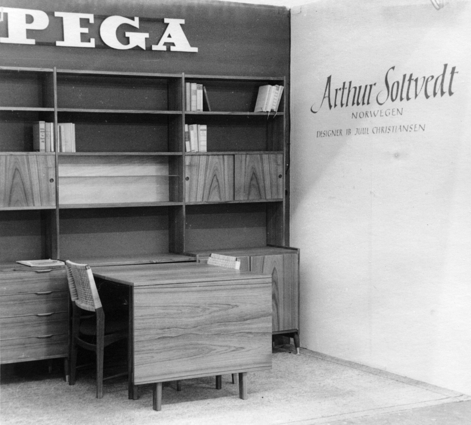 Arthur Soltvedt Møbelfabrikk viser frem Pega-systemet på møbelmessen i Køln, 1960